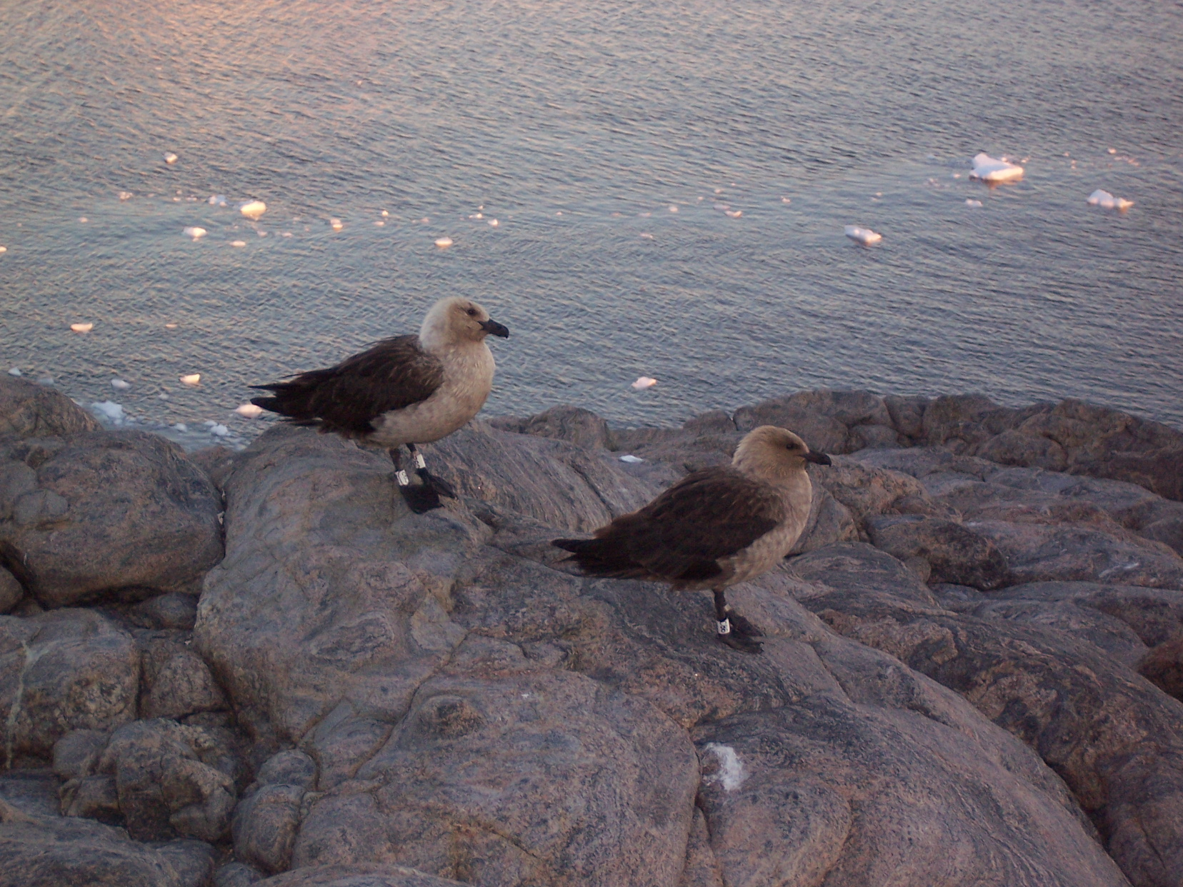 Famille de skuas. Photo prise à coté de la base française Dumont d'Urville en Antarctique.